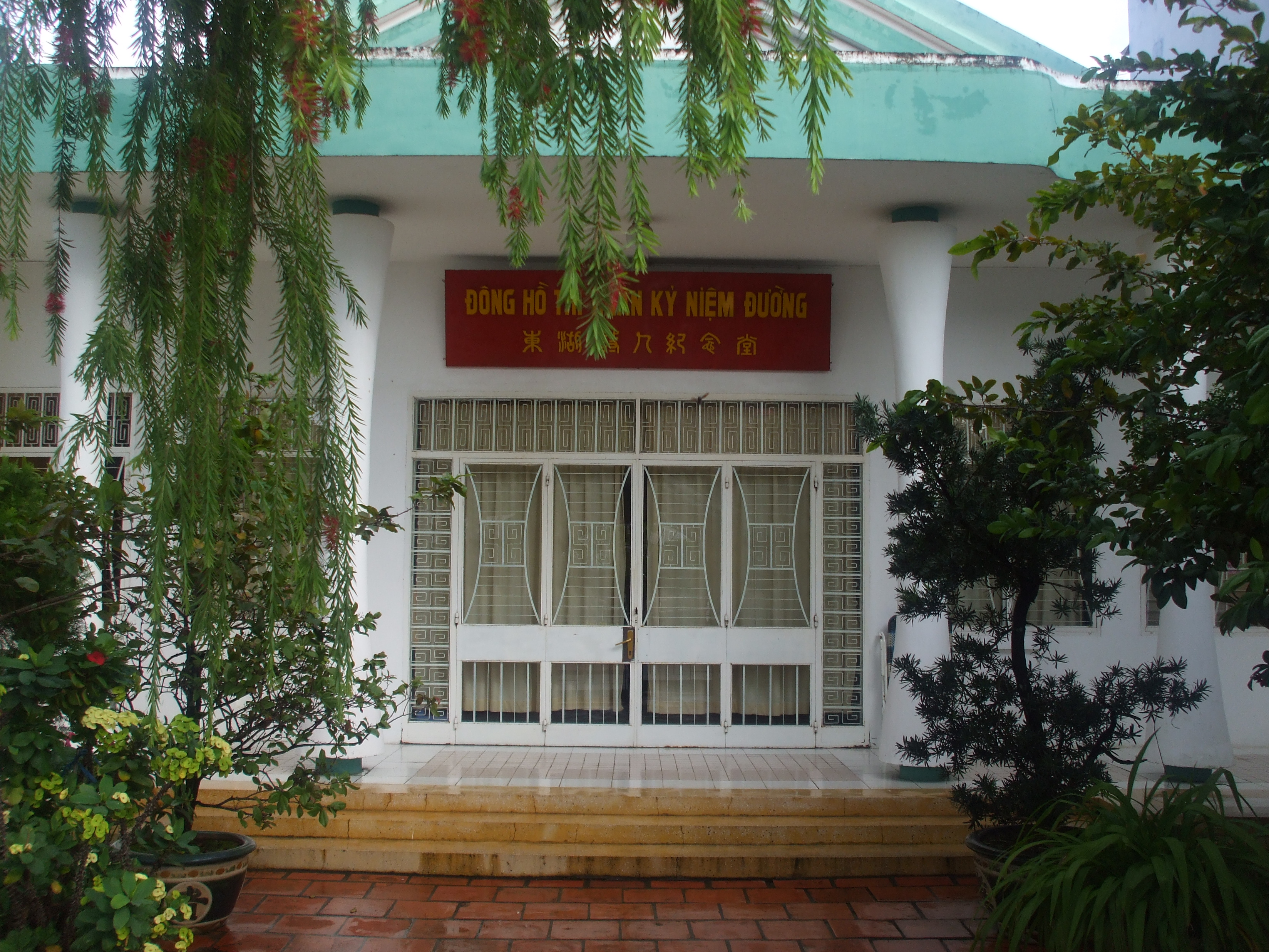 Nhà kỷ niệm thi sĩ Đông Hồ ở thị xã Hà Tiên, Kiên Giang, Việt Nam.